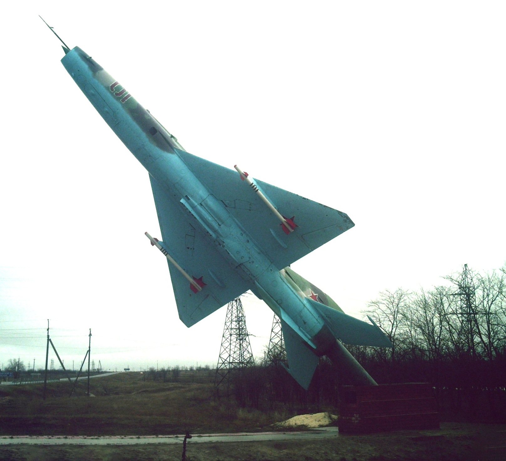 Памятник лётчикам — выпускникам Качинского училища, сражавшимся в Сталинградской битве. Котельниково Волгоградской области, Россия.